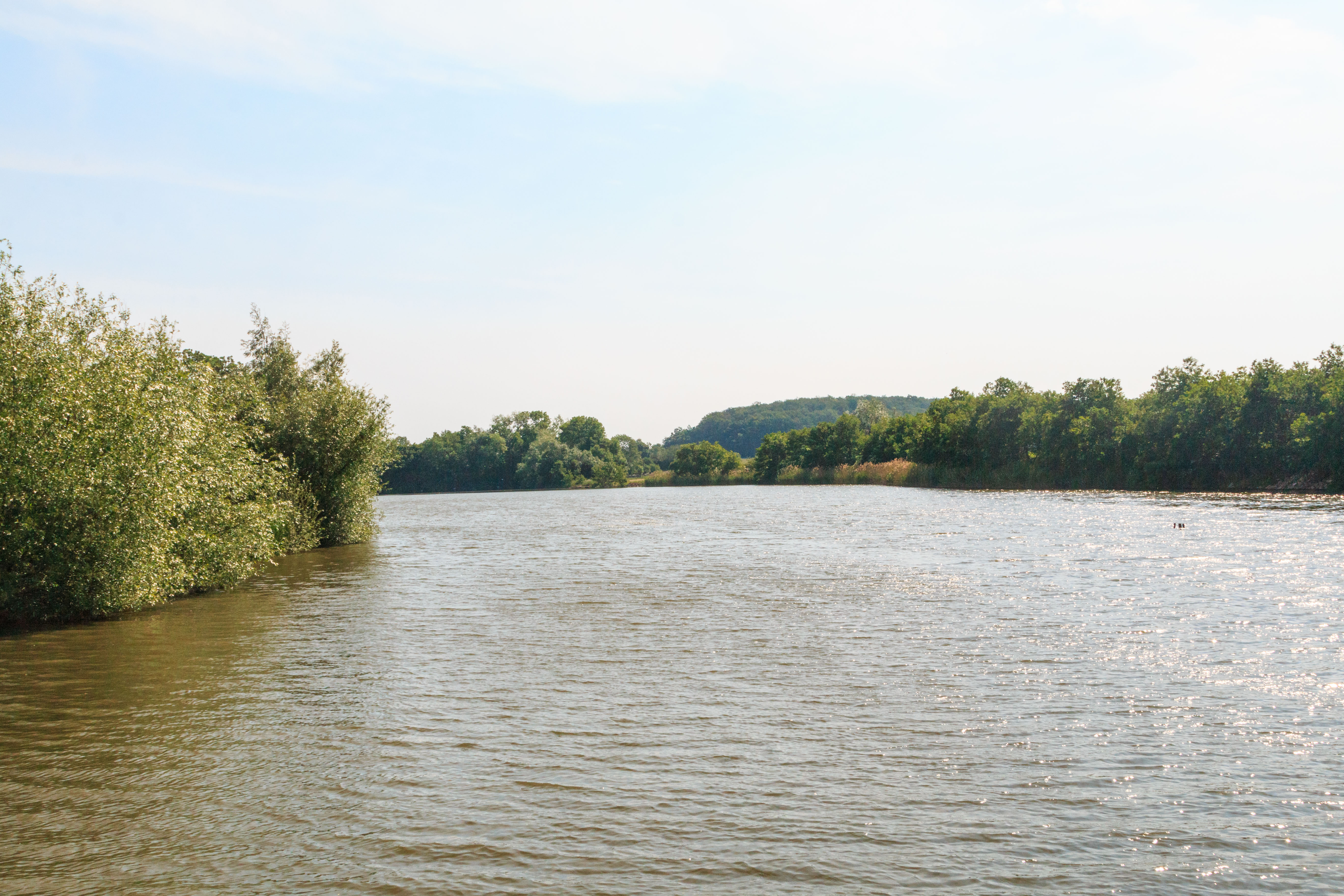 Rybník Šmejkal u Vysokého Veselí Project: Vodstvo.